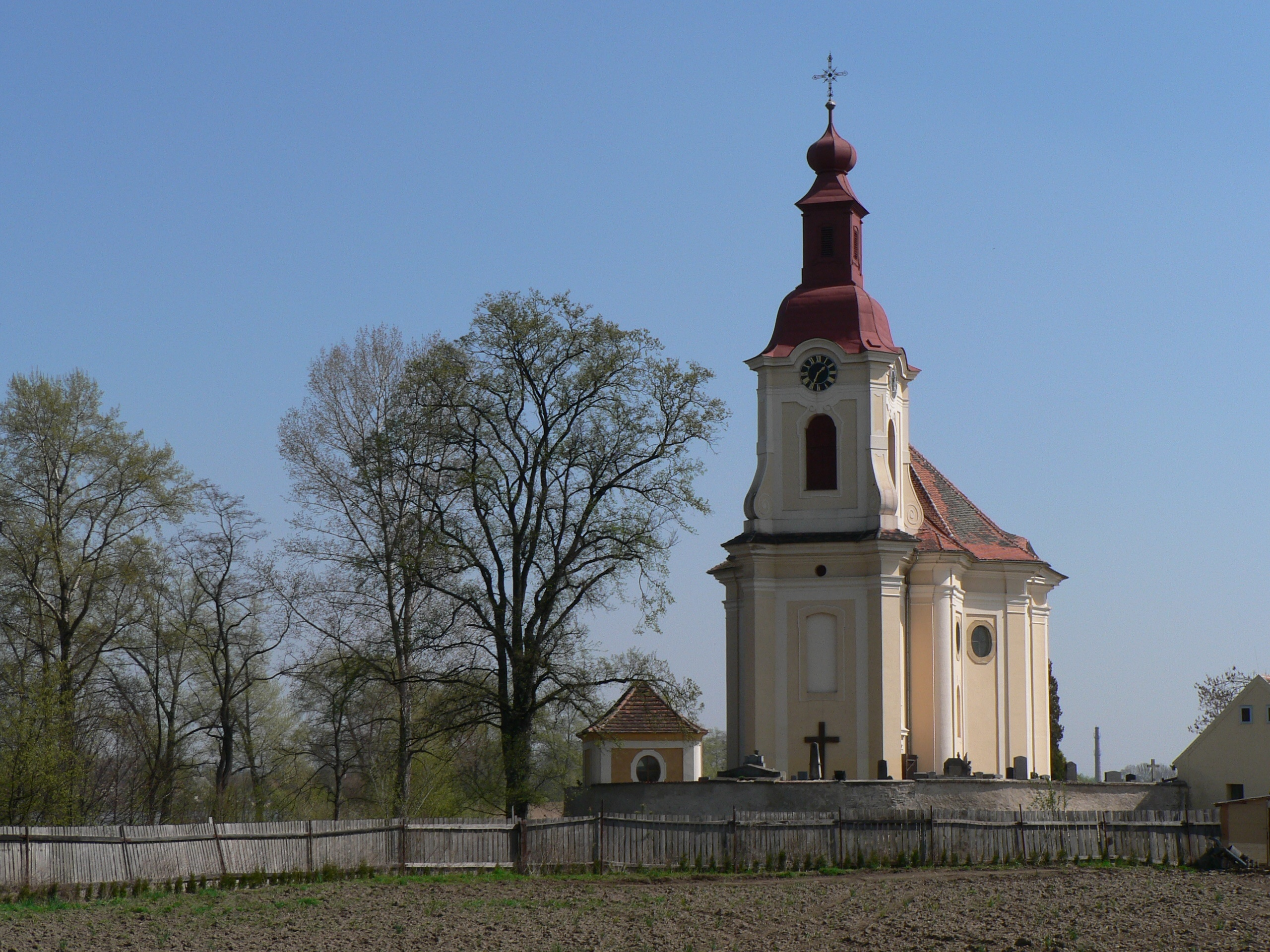 Kostel sv. Vojtěcha v Počaplech, dílo K. I. Dientzenhofera.